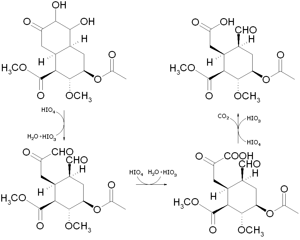 Zweite Hälfte des neunten Schritts der Reserpin-Totalsynthese nach Woodward.